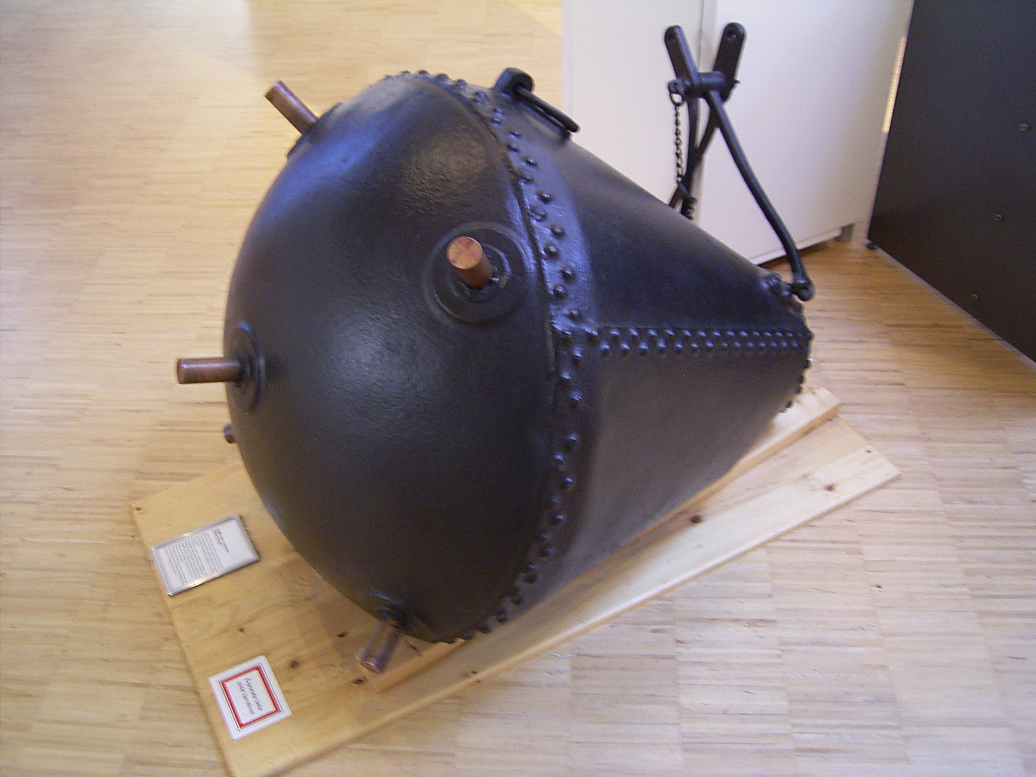 Gefäß einer russischen Ankertaumine aus dem 1. Weltkrieg. Die Mine enthielt etwa 200 kg Sprengstoff und wurde durch Bronzekappen mit säuregeüllten Glasampullen gezündet.